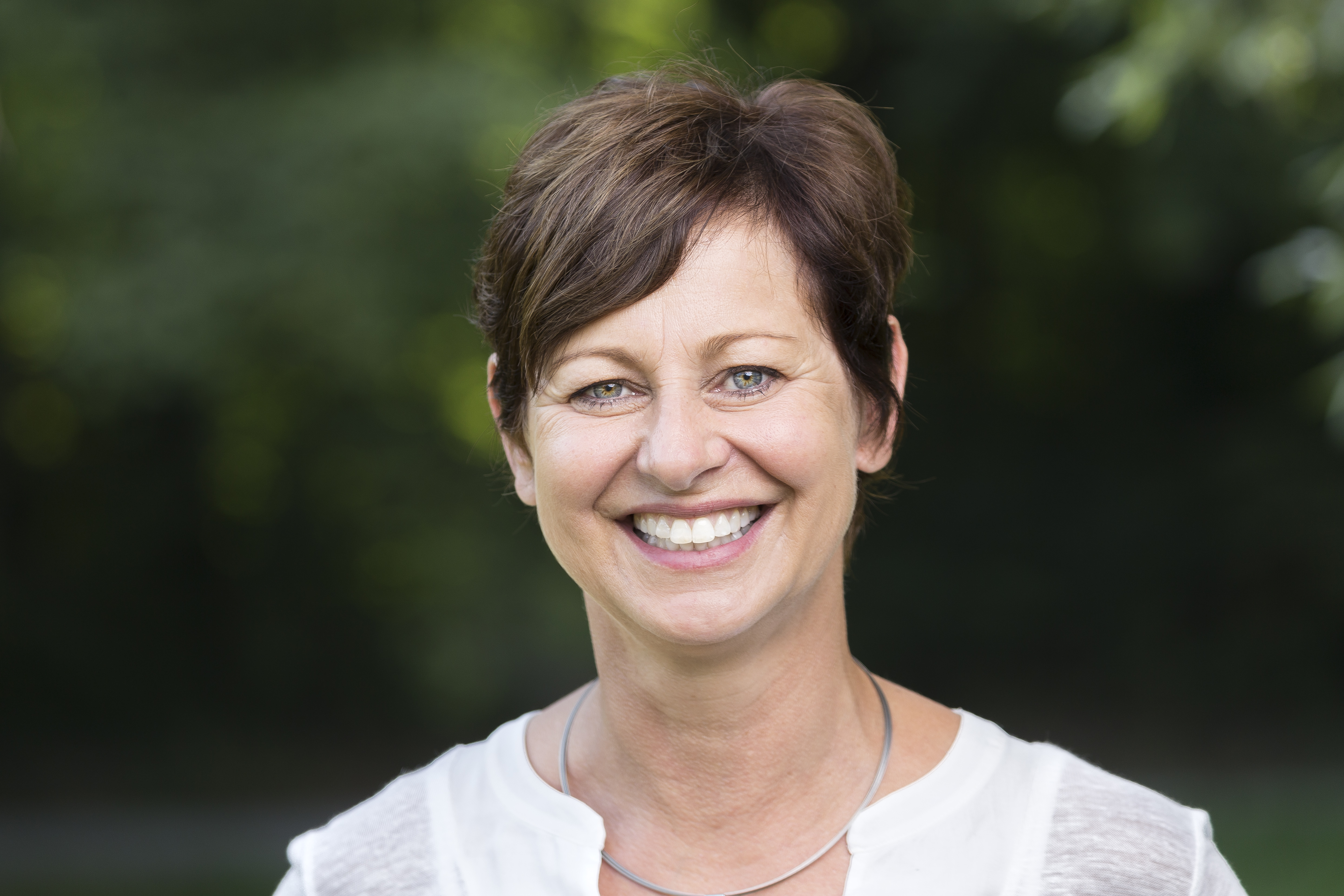 Sigi Hagl (August 2017)